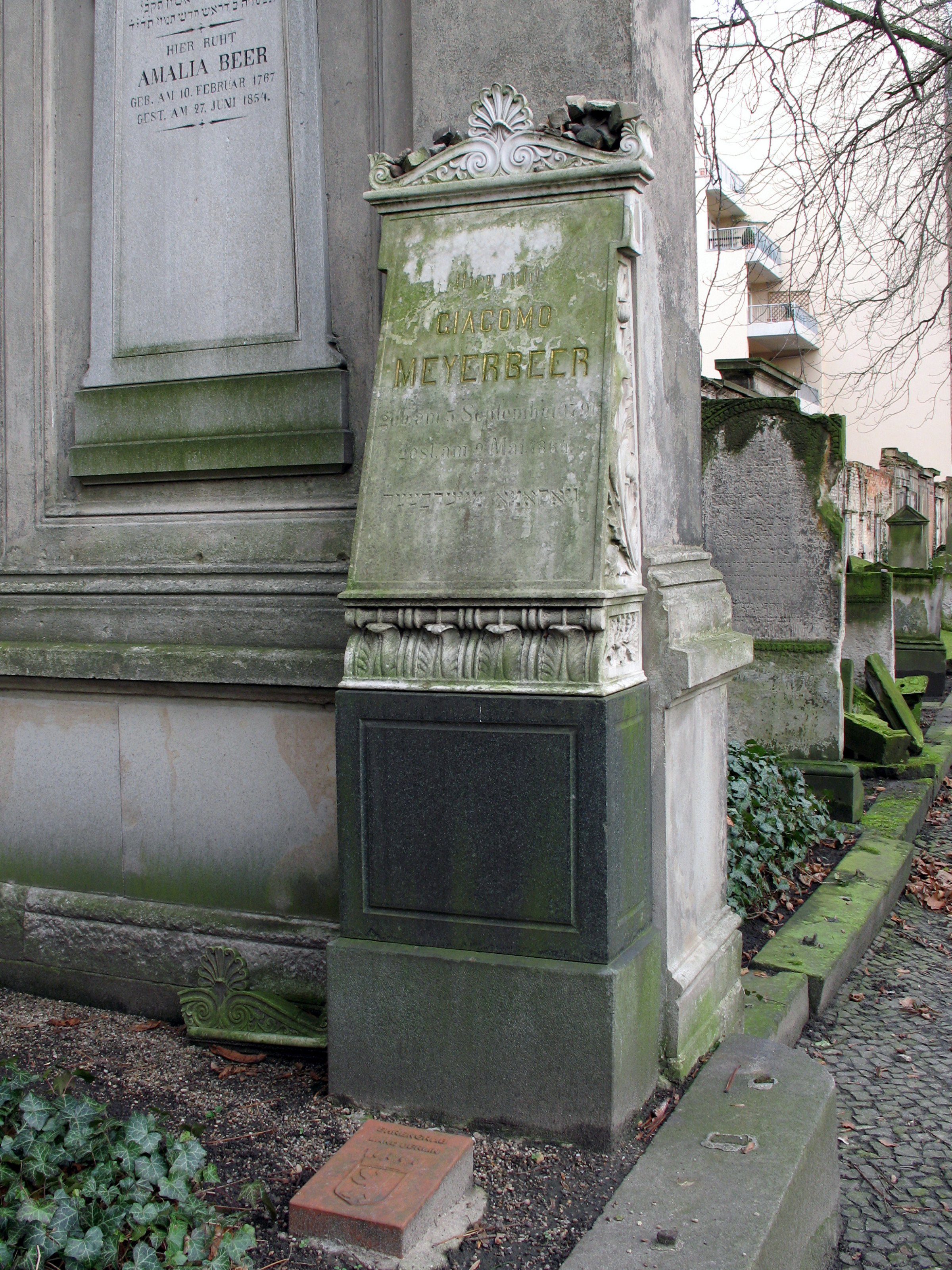 Alter Jüdischer Friedhof, Berlin-Prenzlauer Berg. Grab von Giacomo Meyerbeer; Ehrengrab